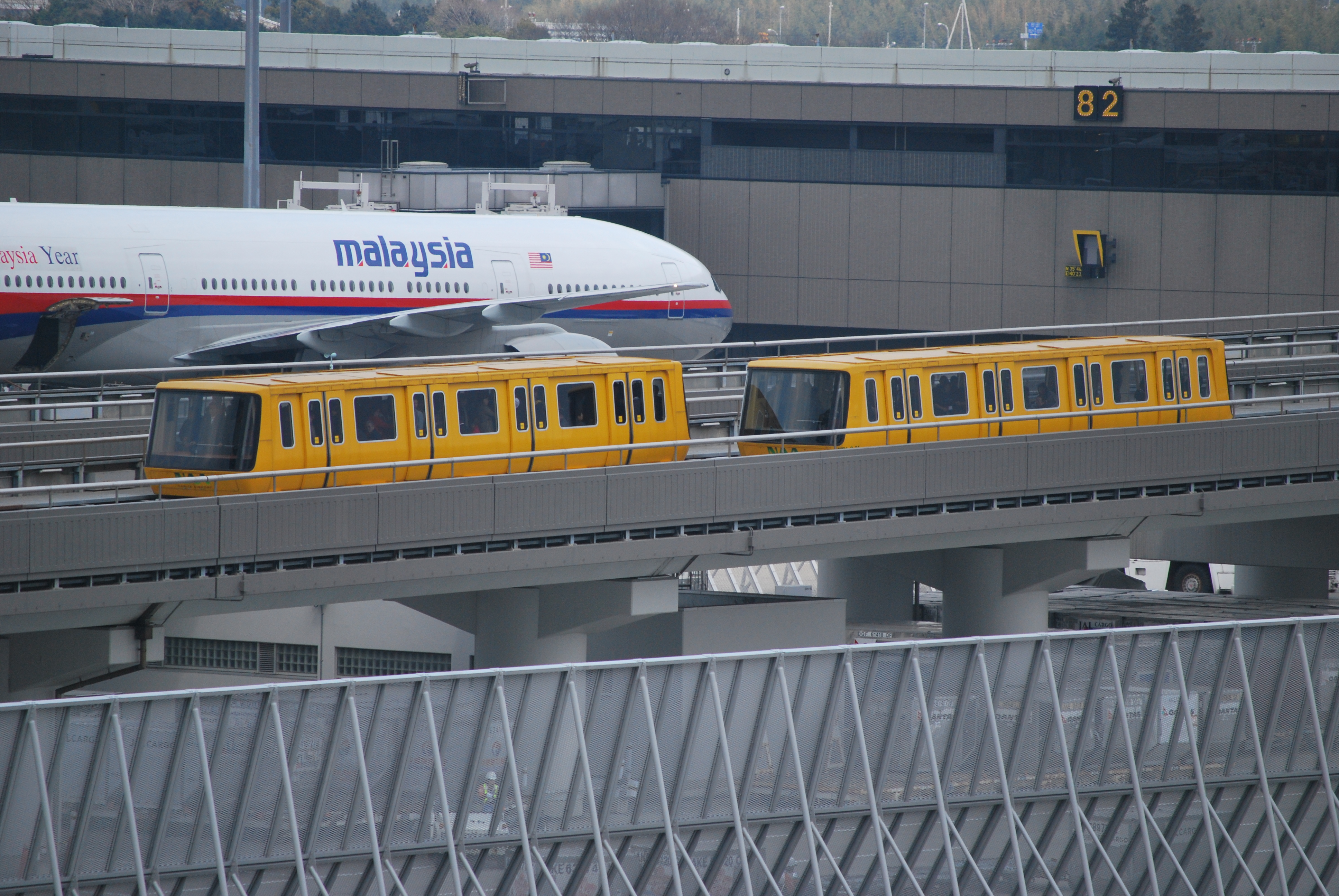 成田空港に設置されているオーチス製水平エレベーターです。